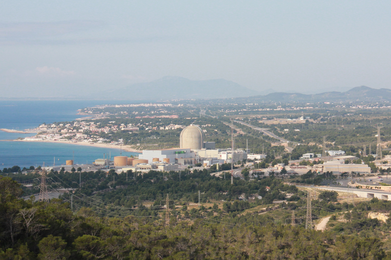 Атомная станция Вандельос. Вид со смотровой площадки La Rojala-Platja del Torn